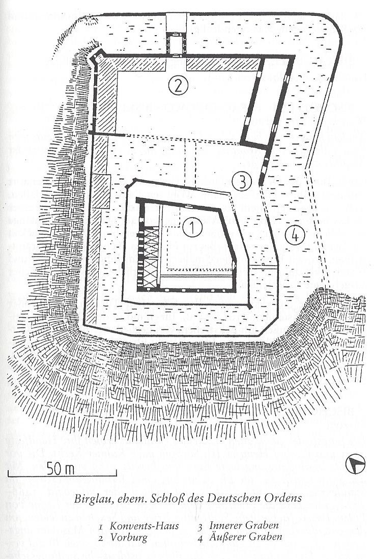 Grundriss von Schloss Birglau in Ostpreußen